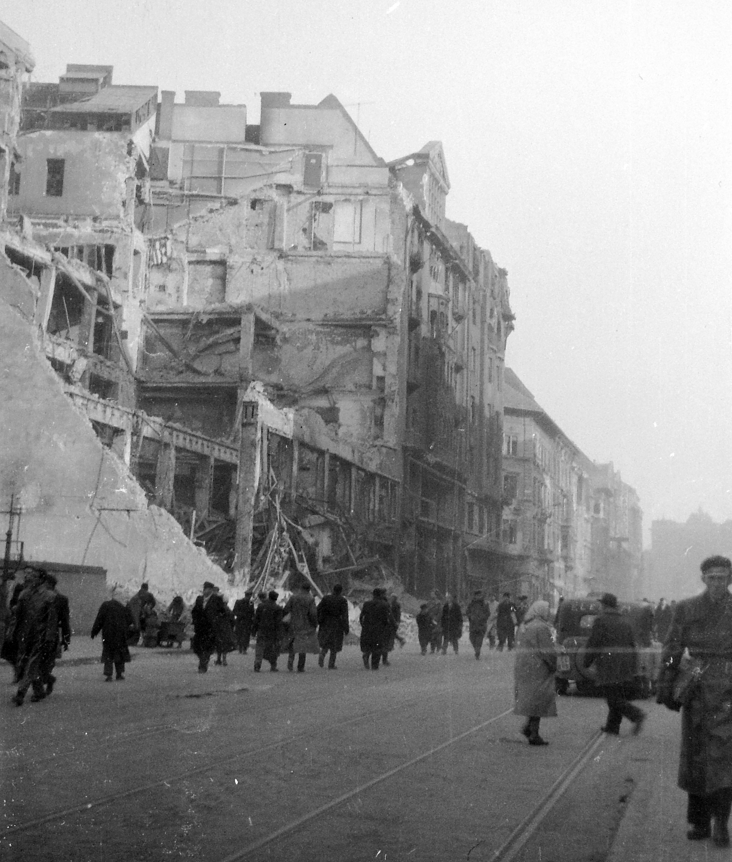 Budapest VII. Rákóczi út a Szövetség utca felől a Keleti pályaudvar felé nézve